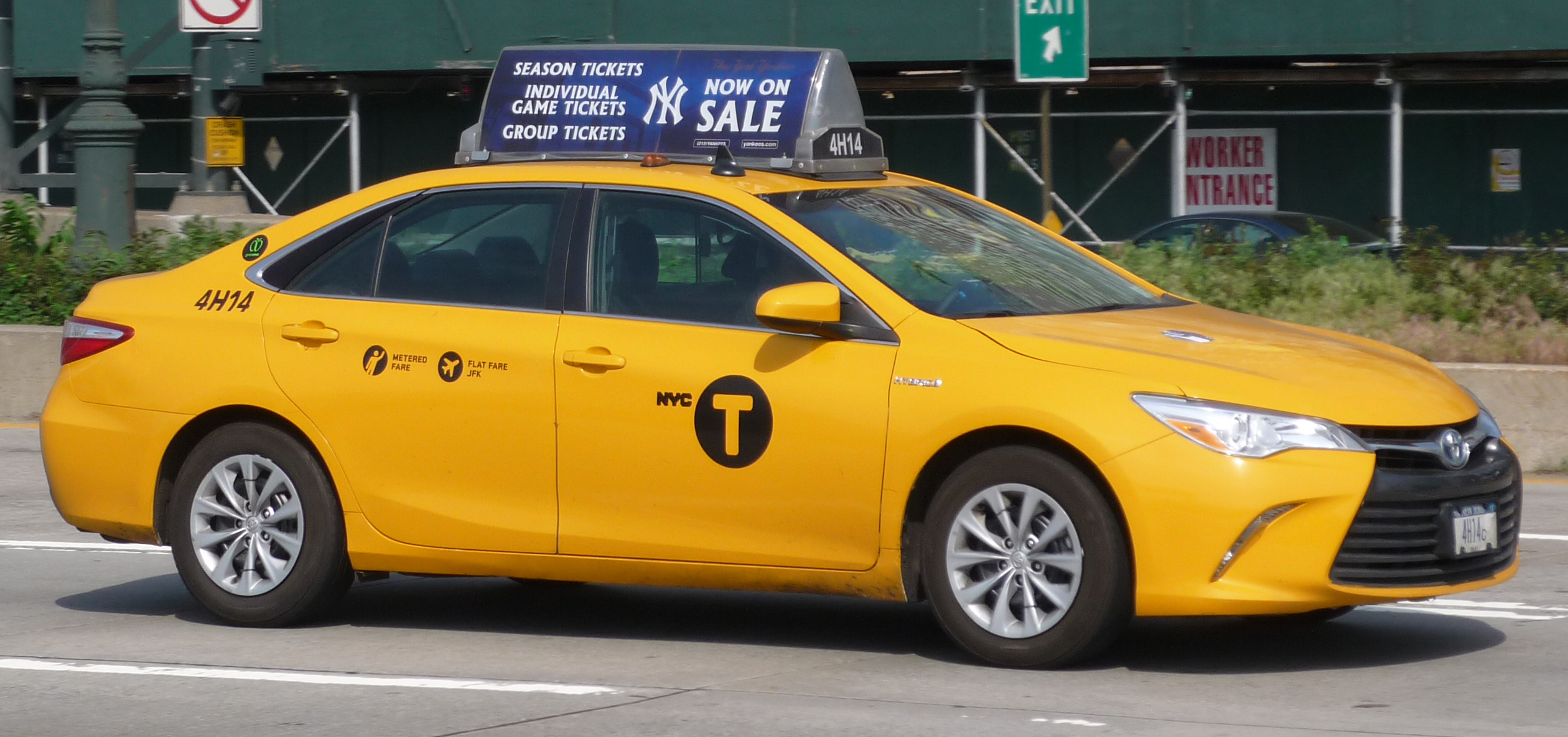 NYC Taxi Toyota Camry